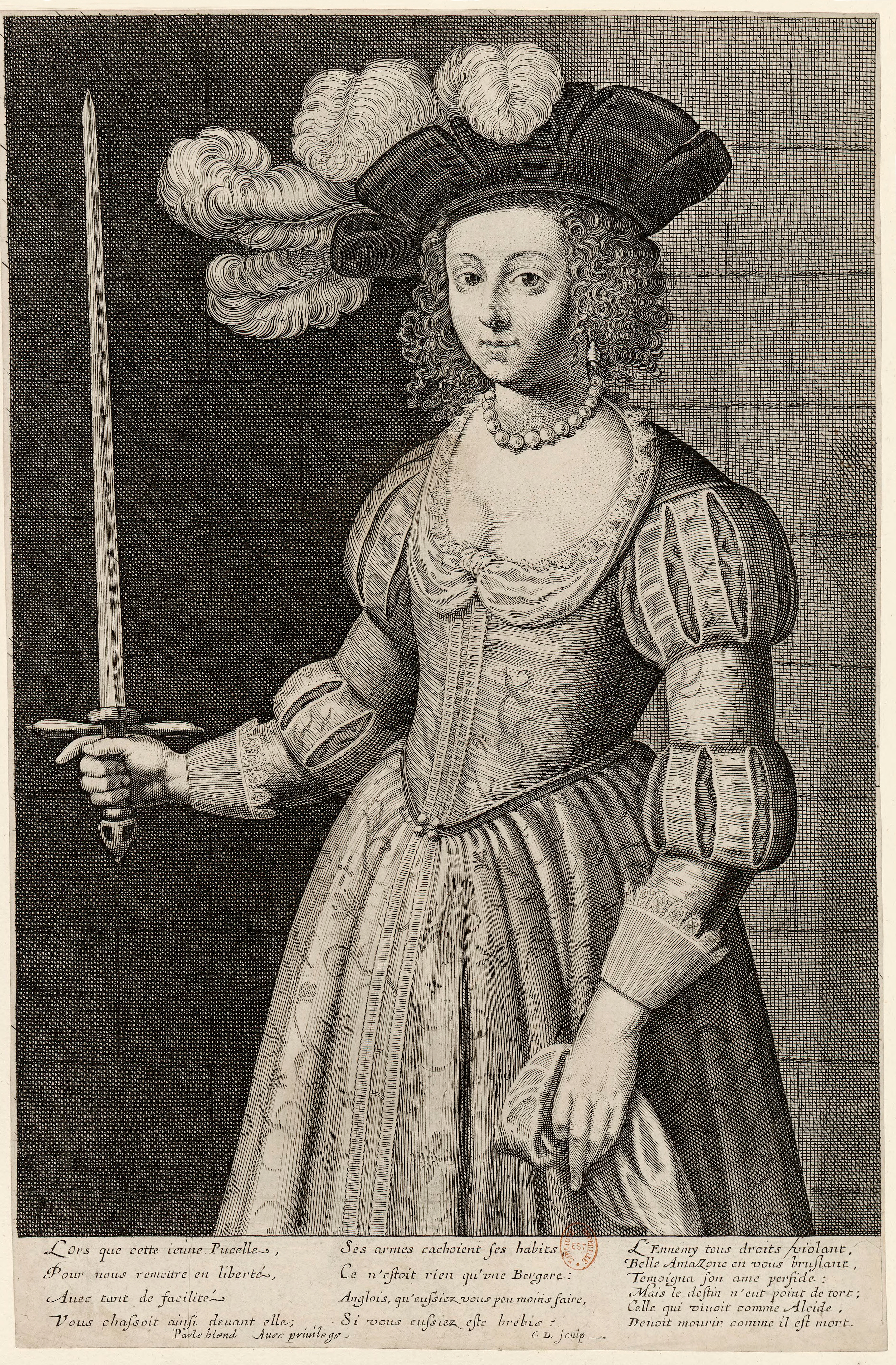 Jeanne d'Arc Gravure (36,1 cm x 24,2 cm) éditée par Jean Leblond I ou Jean Leblond II. Début du XVIIe siècle. Graveur Charles David (1600-1636). Bibliothèque nationale de France, n° inv : Qb 1 1431 / ark:/12148/btv1b84001613 - Le texte est un extrait emprunté au poète normand Pierre Patrix (1583-1671).